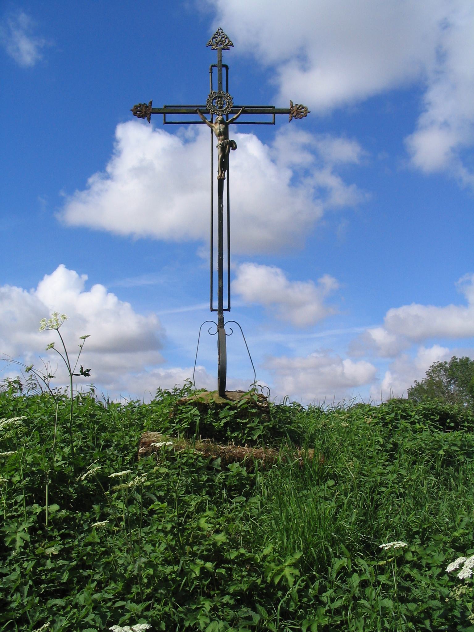 Calvaire situé à Warmaise (Chepoix, Oise)